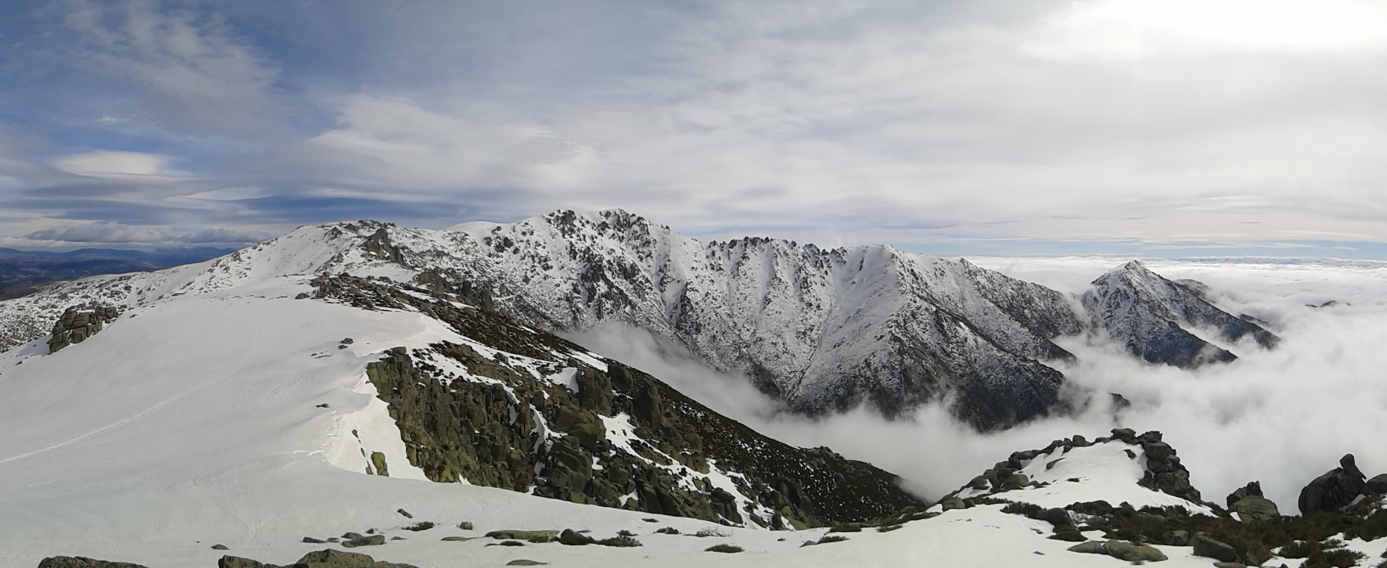 Pico de La Mira (2343 m) visto desde los campanarios en la Sierra de Gredos. This is a photography of a Site of Community Importance in Spain with the ID: ES4110002. Natura2000 entry, EEA entry